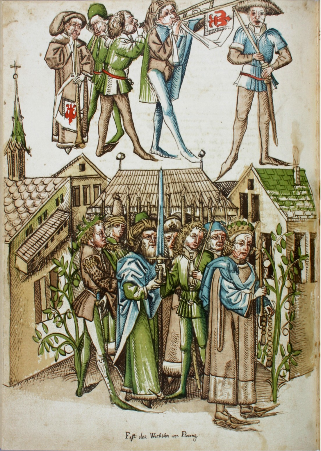 Rosgartenmuseum Konstanz, Hs. 1, Richental: Konzilschronik. In: Feger, Otto (Bearb.): Ulrich Richental: Das Konzil zu Konstanz. Faksimile. Starnberg - Konstanz 1964. Fol. 66v